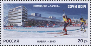 XXII Олимпийские зимние игры 2014 года в г. Сочи. Олимпийские спортивные объекты